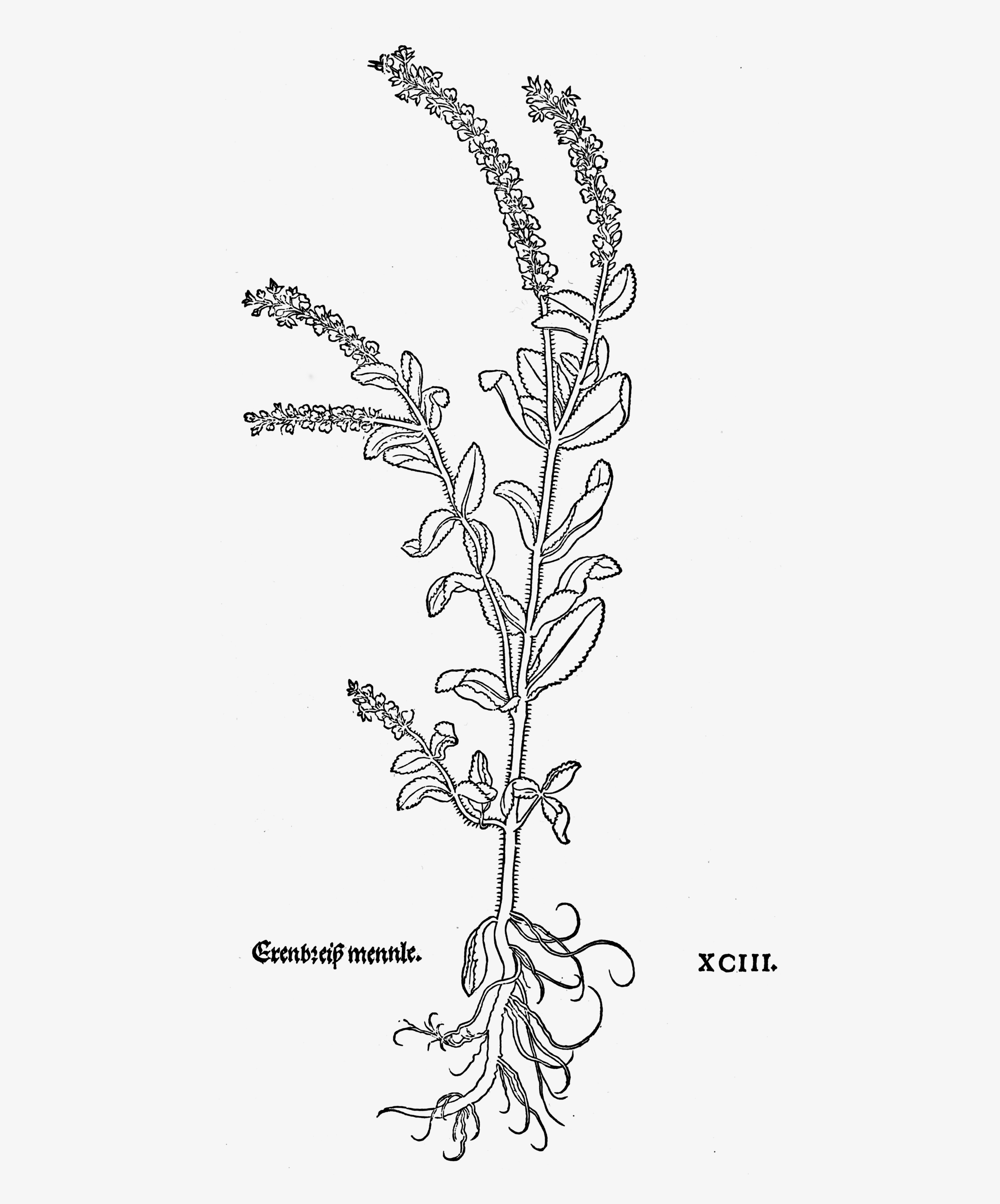 Abb des Ehrenpreiskrauts